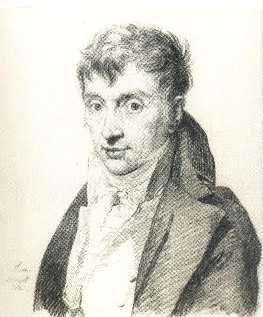 Porträt des Diplomaten und Kunstfreunds Basilius von Ramdohr